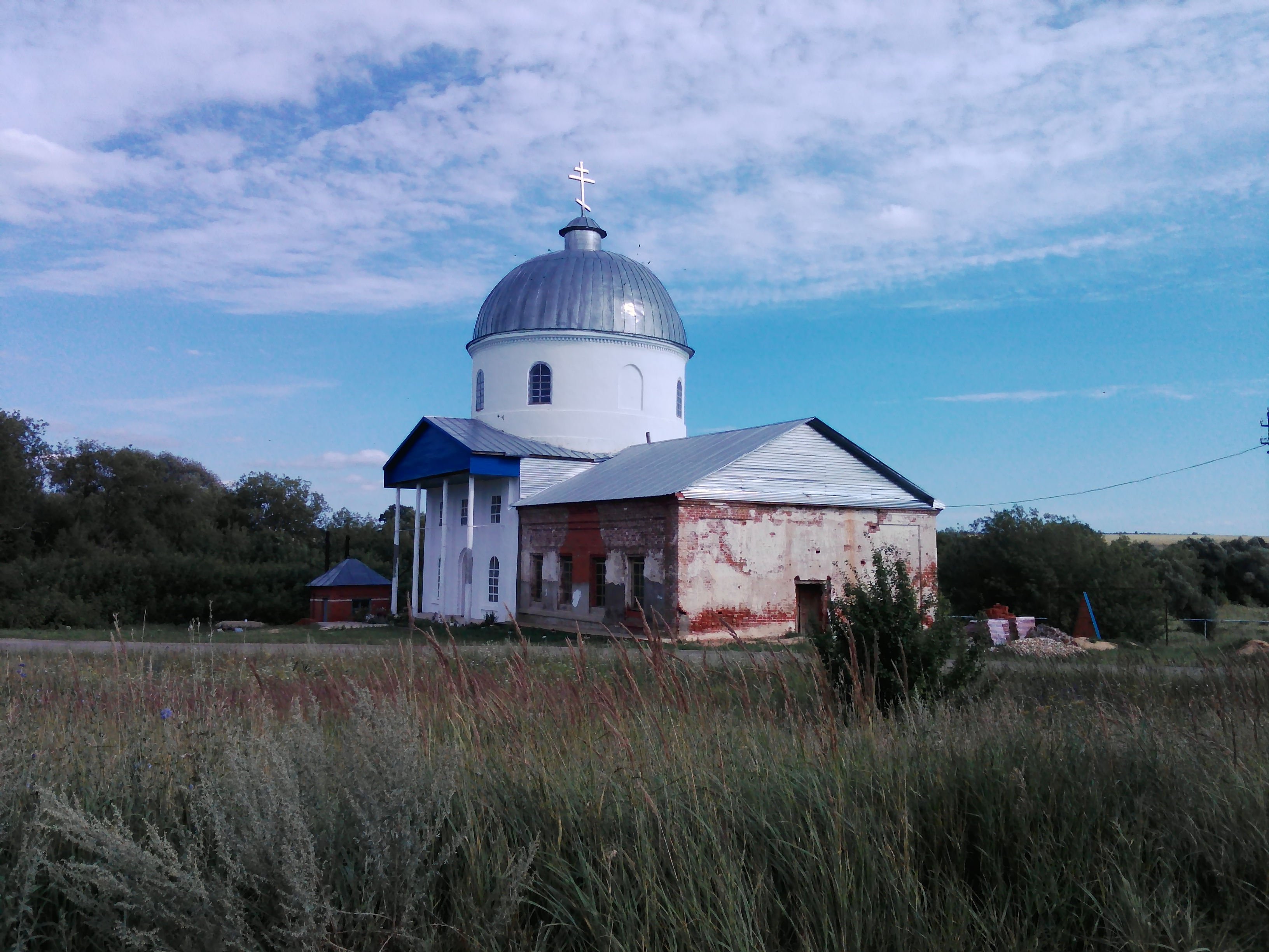 Сергиевская церковь с. Ризоватово